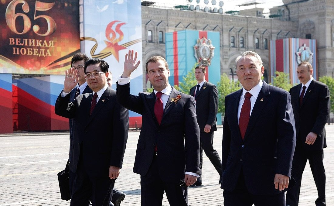 После военного парада, посвящённого 65-летию Победы в Великой Отечественной войне. Слева - Председатель КНР Ху Цзиньтао. Справа - Президент Казахстана Нурсултан Назарбаев.